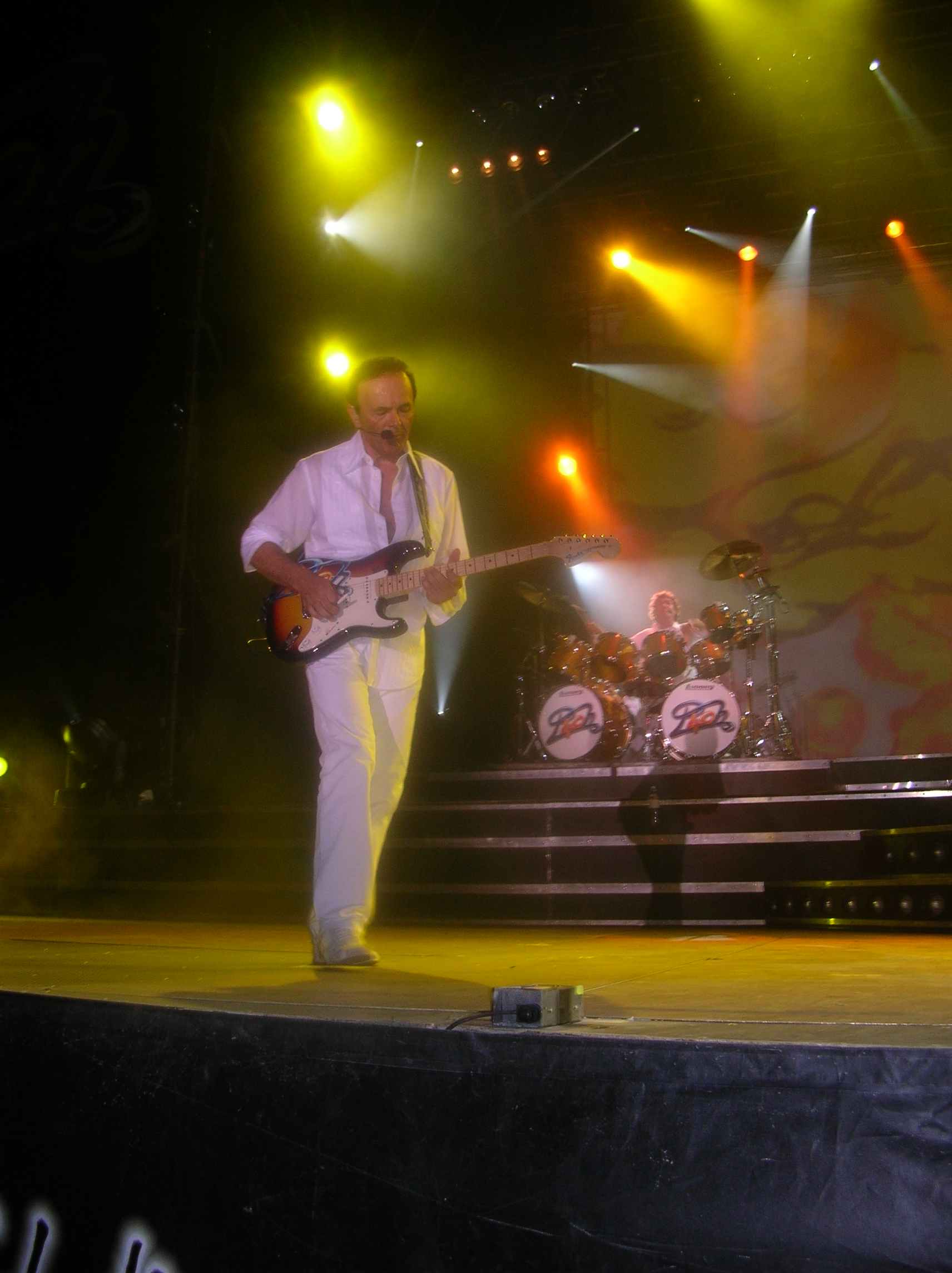 Dodi Battaglia durante il concerto del tour "La Grande Festa" a Catanzaro nel 2006